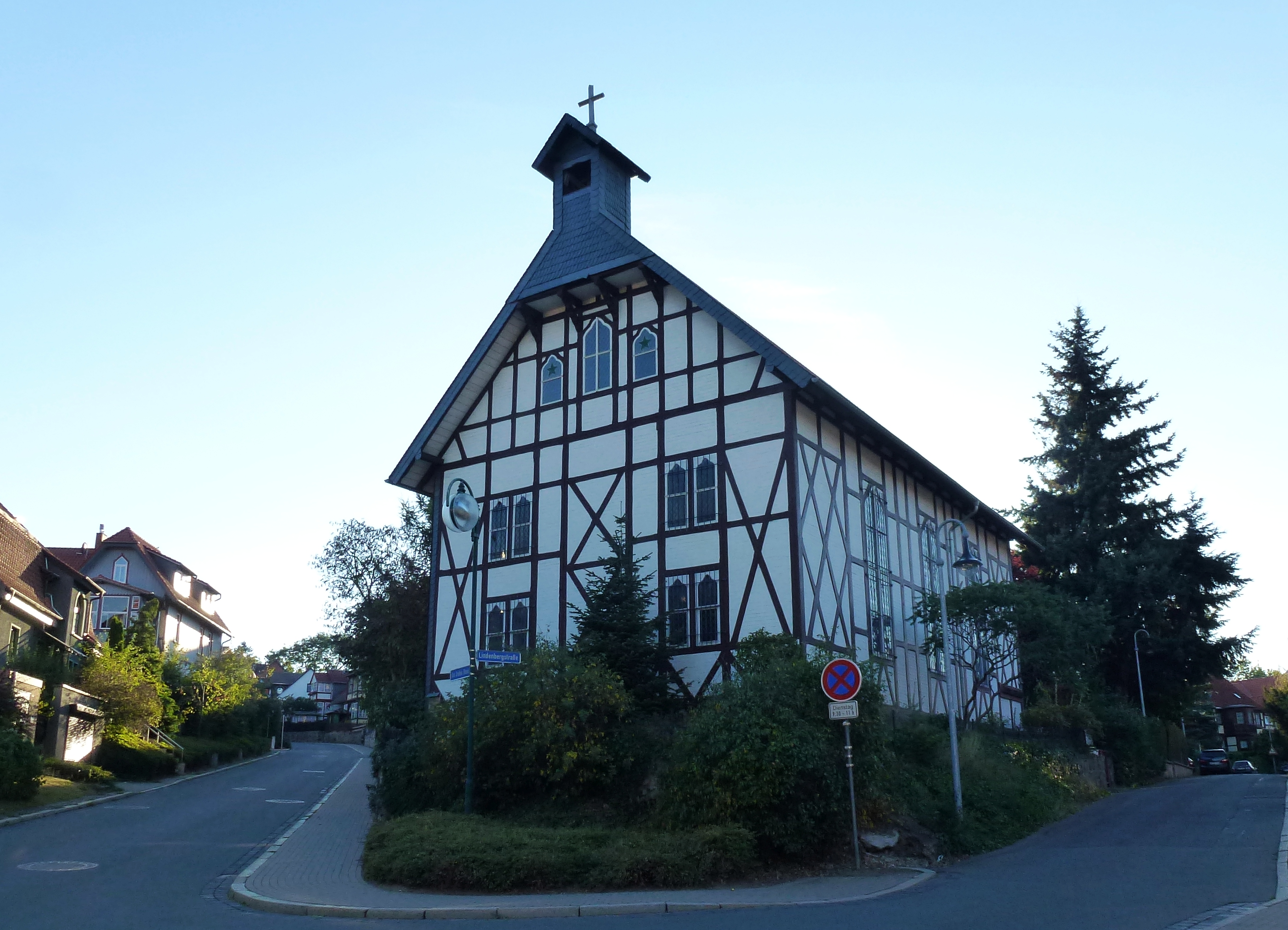 Die Kreuzkirche am Lindenberg in Nöschenrode ist eine Fachwerkkirche aus dem Jahr 1873. Die Kanzel von 1611 im Inneren stammt aus der abgerissenen Nicolaikirche am Nicolaiplatz.